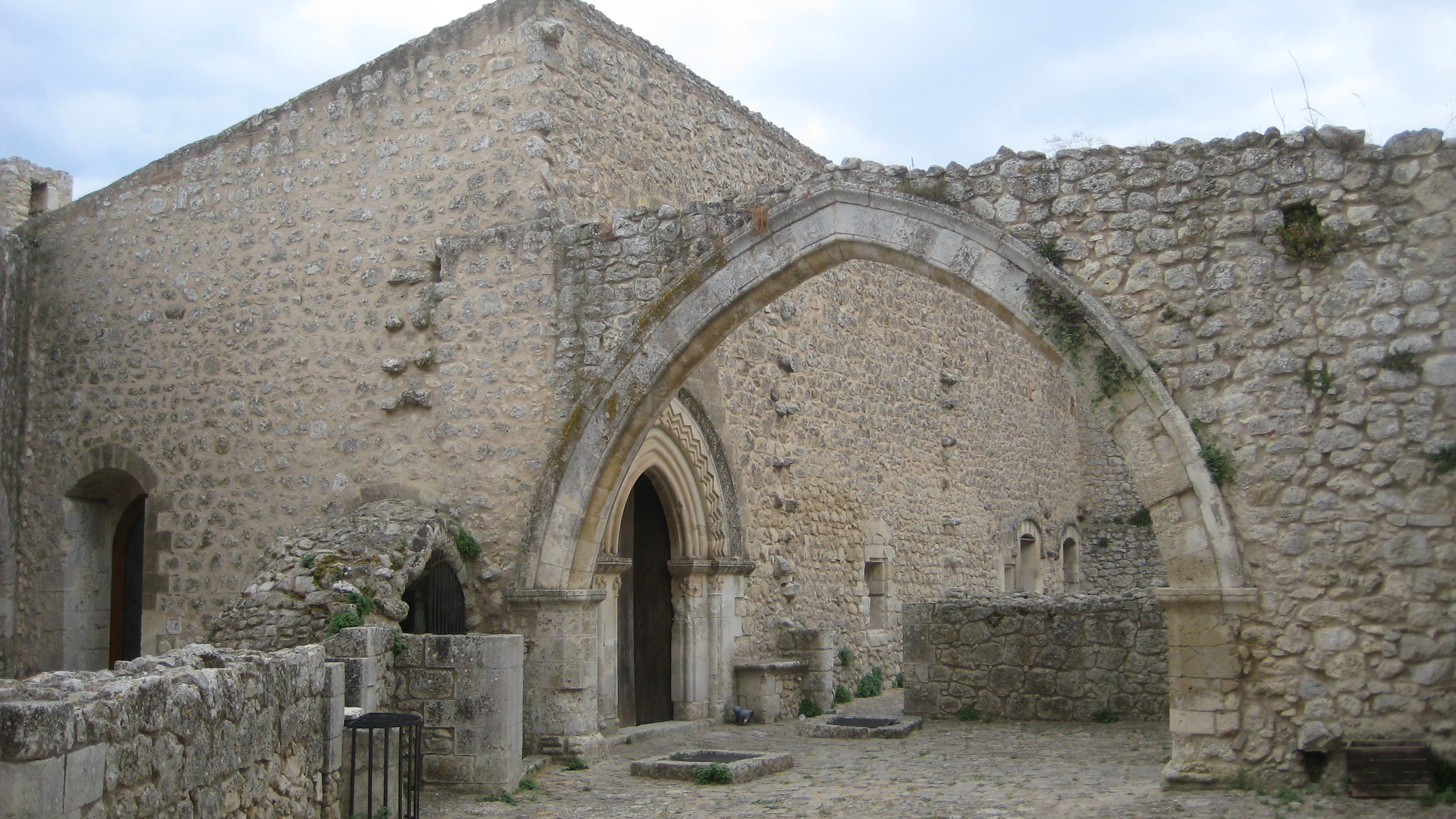 Corte interna del castello di Mussomeli (o Castello Manfredonico), a Mussomeli (provincia di Caltanissetta, Sicilia)